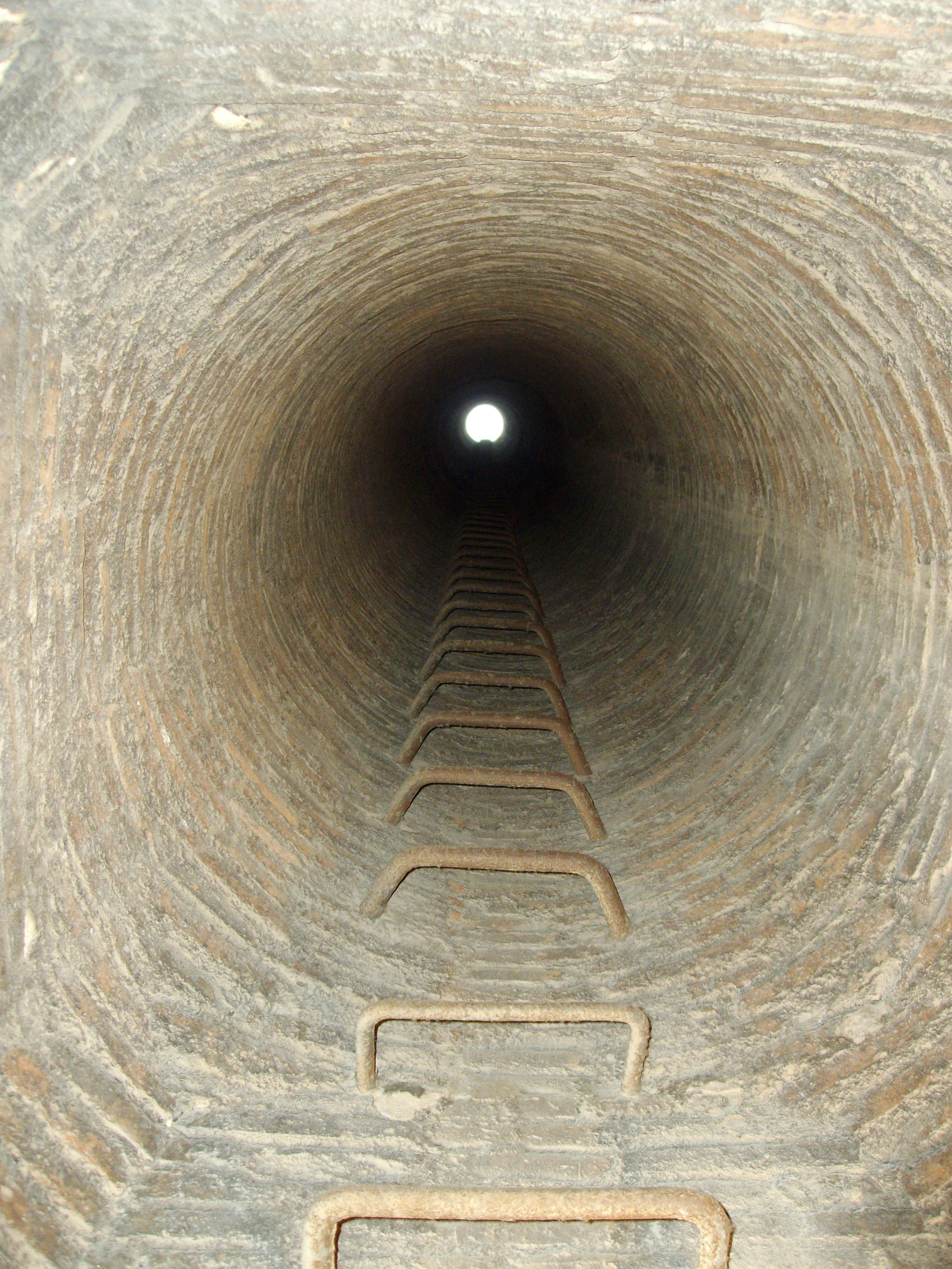 Interior de la chimenea del Vapor Buxeda Vell.